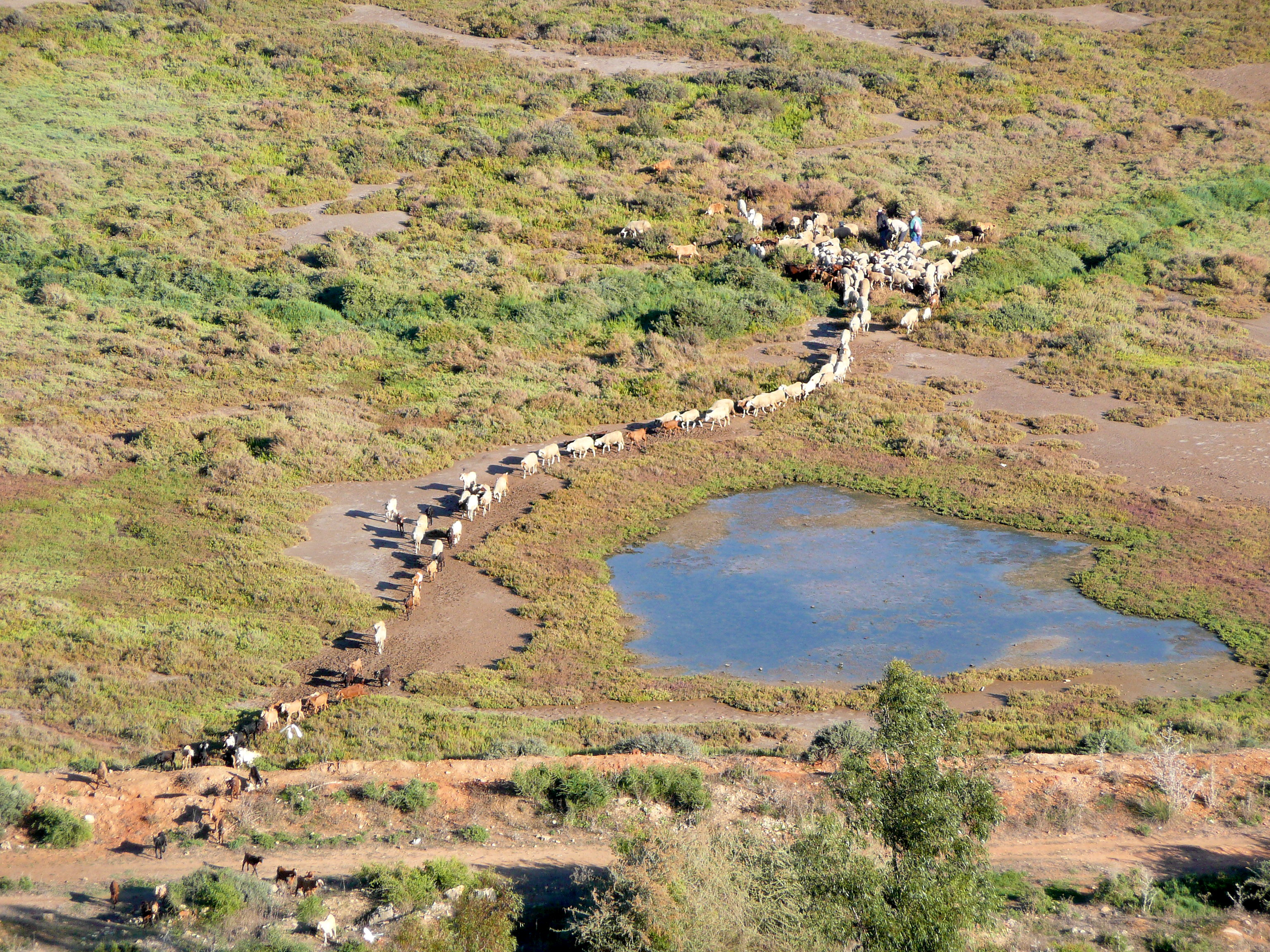 Troupeau de moutons et de chèvres dans la partie inondable de la vallée de l'oued Bou Regreg au pied de la ville de Rabat